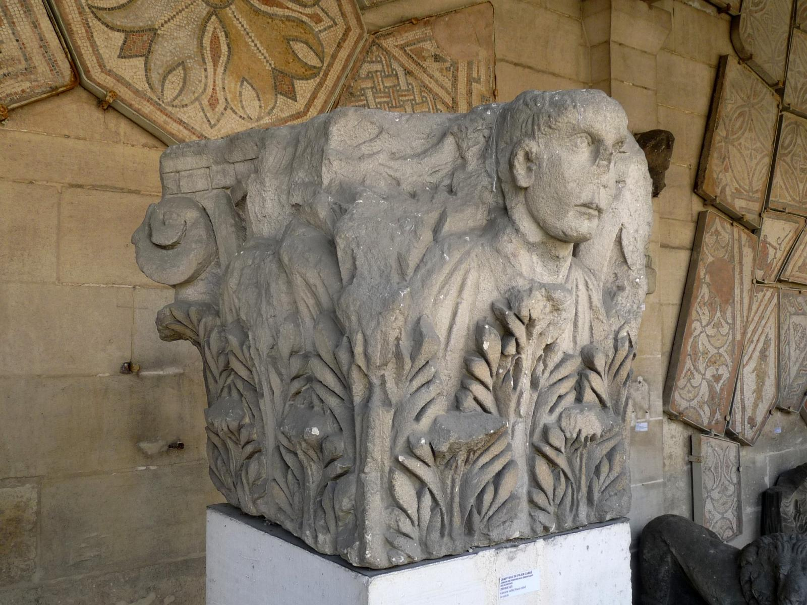 galerie lapidaire du musée archéologique d'Angoulême; chapiteau IIè siècle (fouilles du Crédit Lyonnais, rue des Halles, 1888, Angoulême)